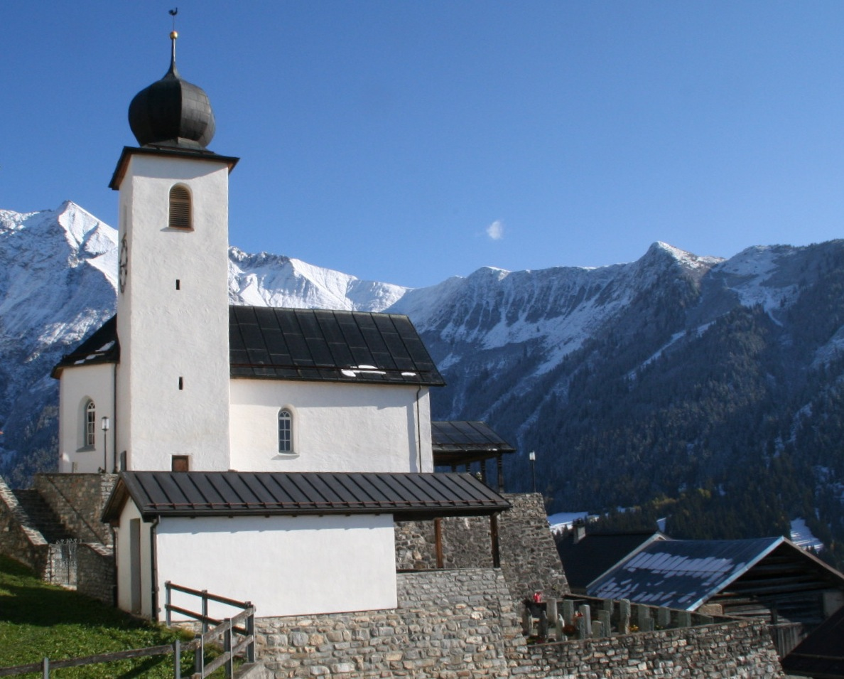 reformierte Kirche Riein, Kanton Graubünden